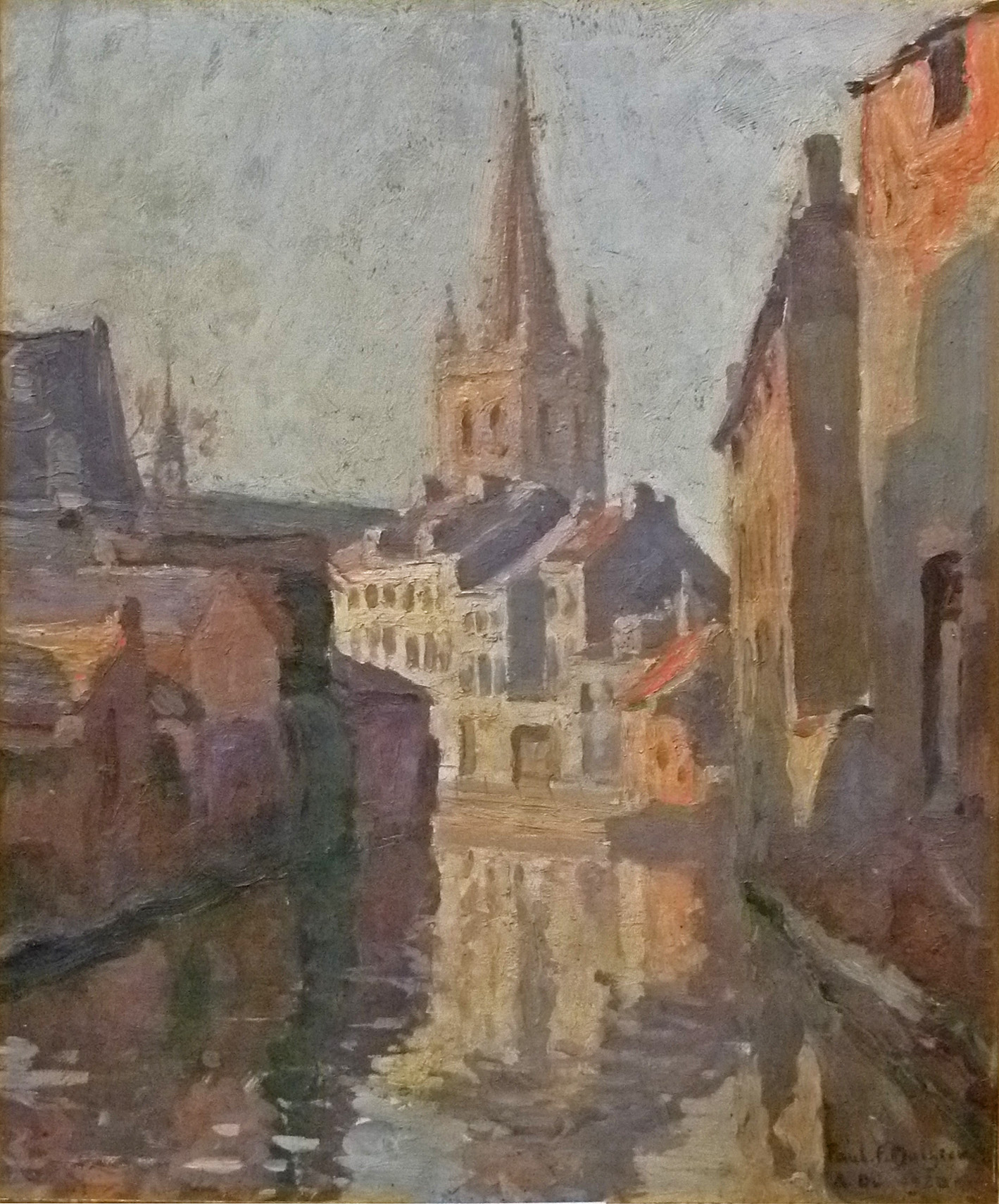 "Matinée de Soleil - La Dyle- Louvain" (1920), olieverf op doek (50 x 40 cm) door de Belgische kunstschilder Paul Mathieu (1872-1932); privébezit